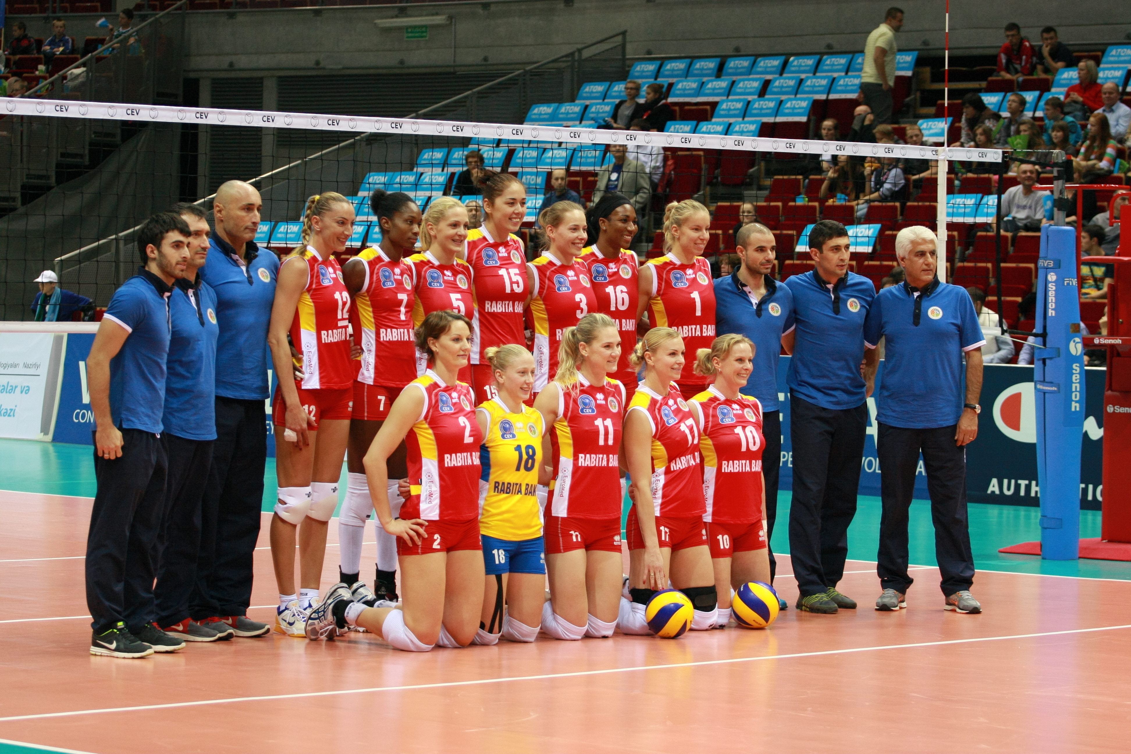 Atom Trefl Sopot vs Rabita Baku